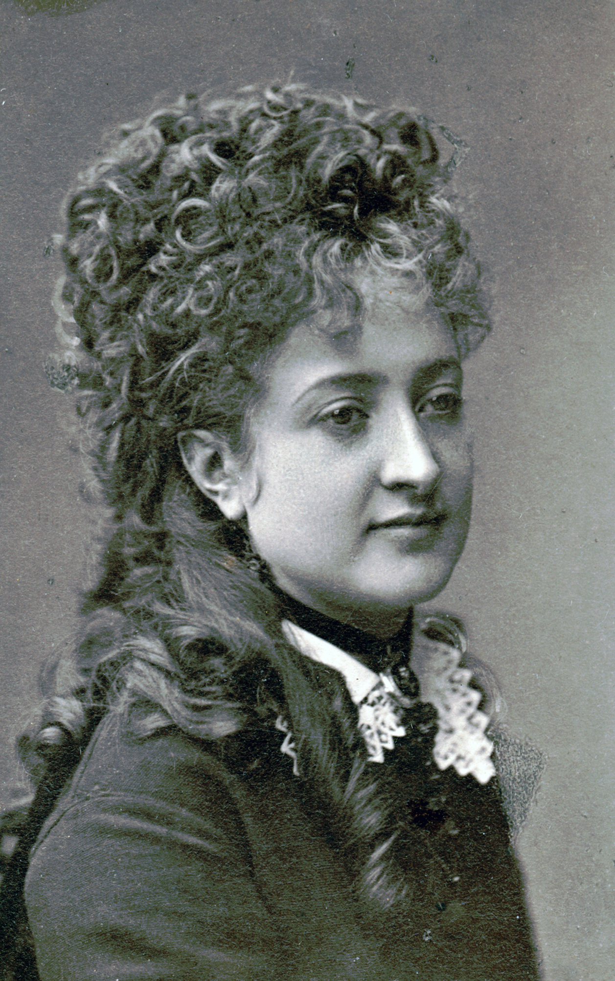 Jenny Fridorff, skådespelare och operettsångare vid Mindre teatern 1874